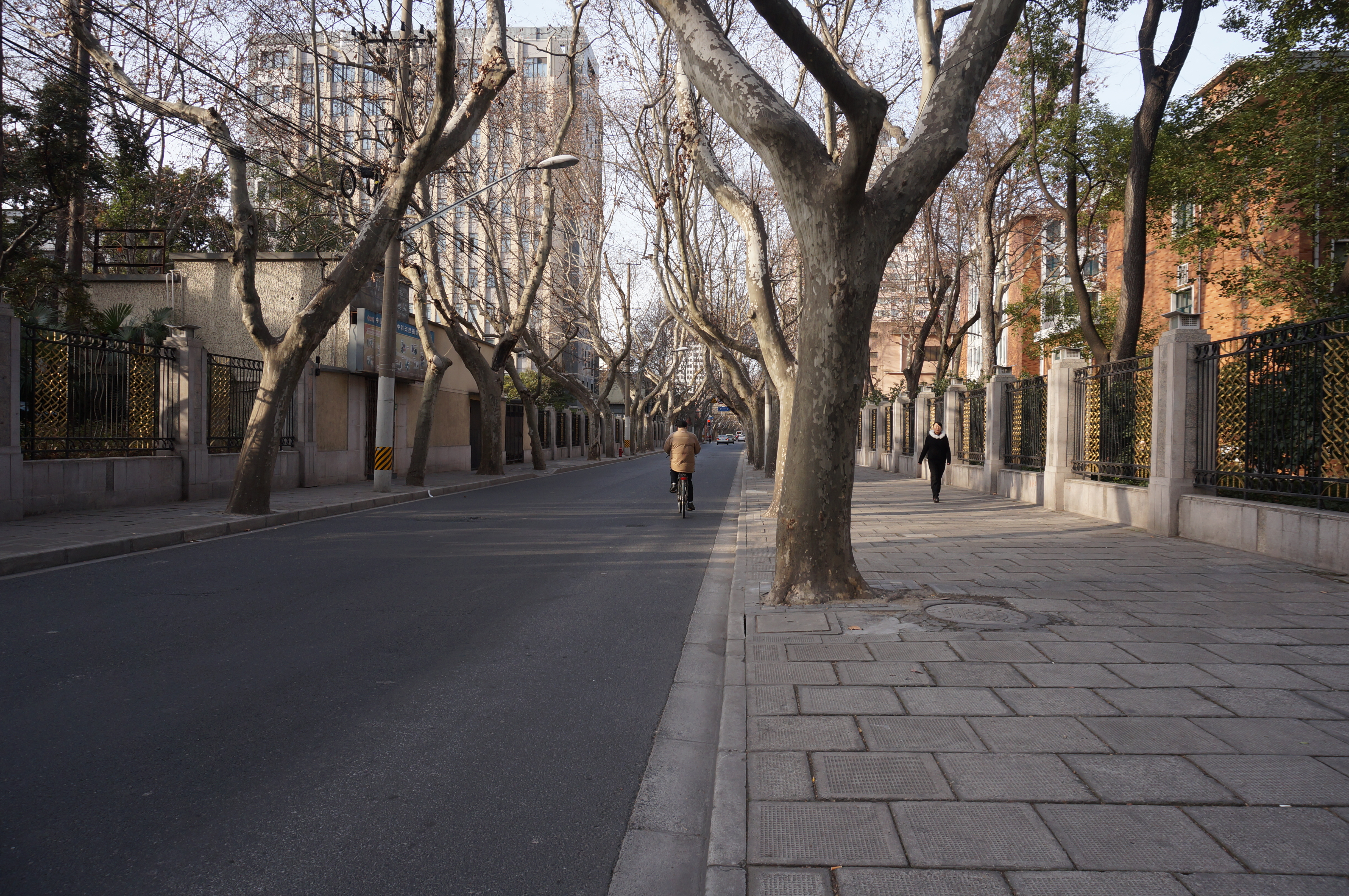 上海岳阳路街景